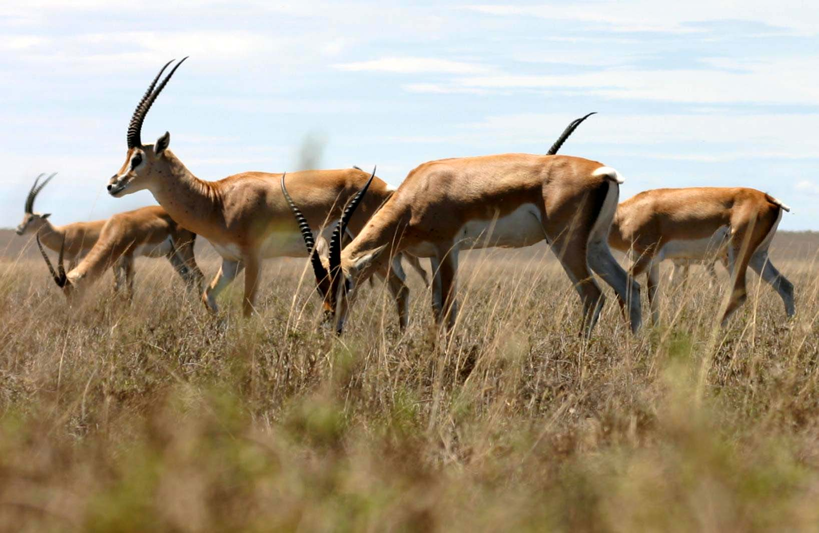 Grant's Gazelle (Nanger granti), Serengeti, Tanzania